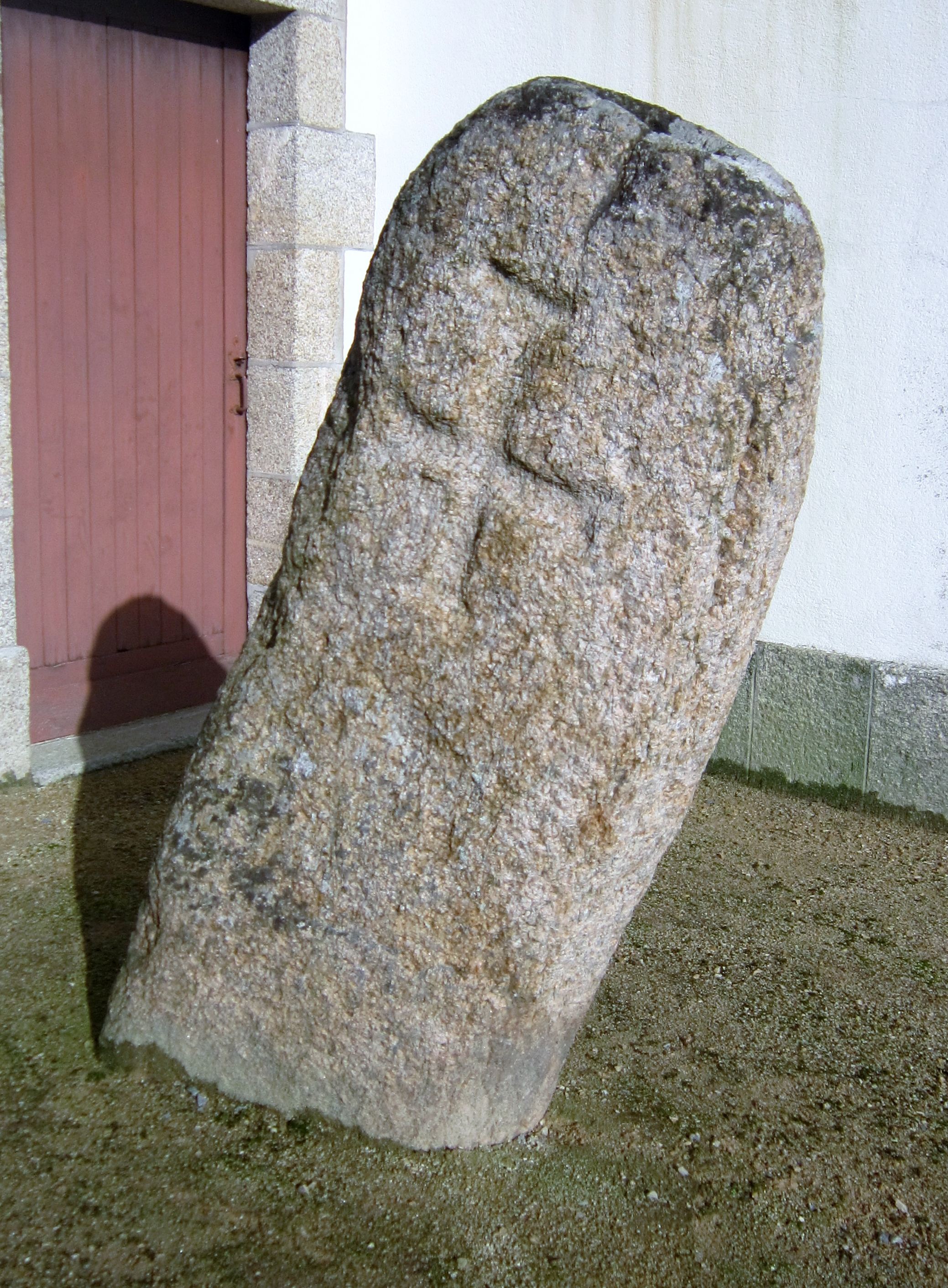 Clohaars-Carnoët : menhir christianisé près de l'église paroissiale Notre-Dame de Trogwall.